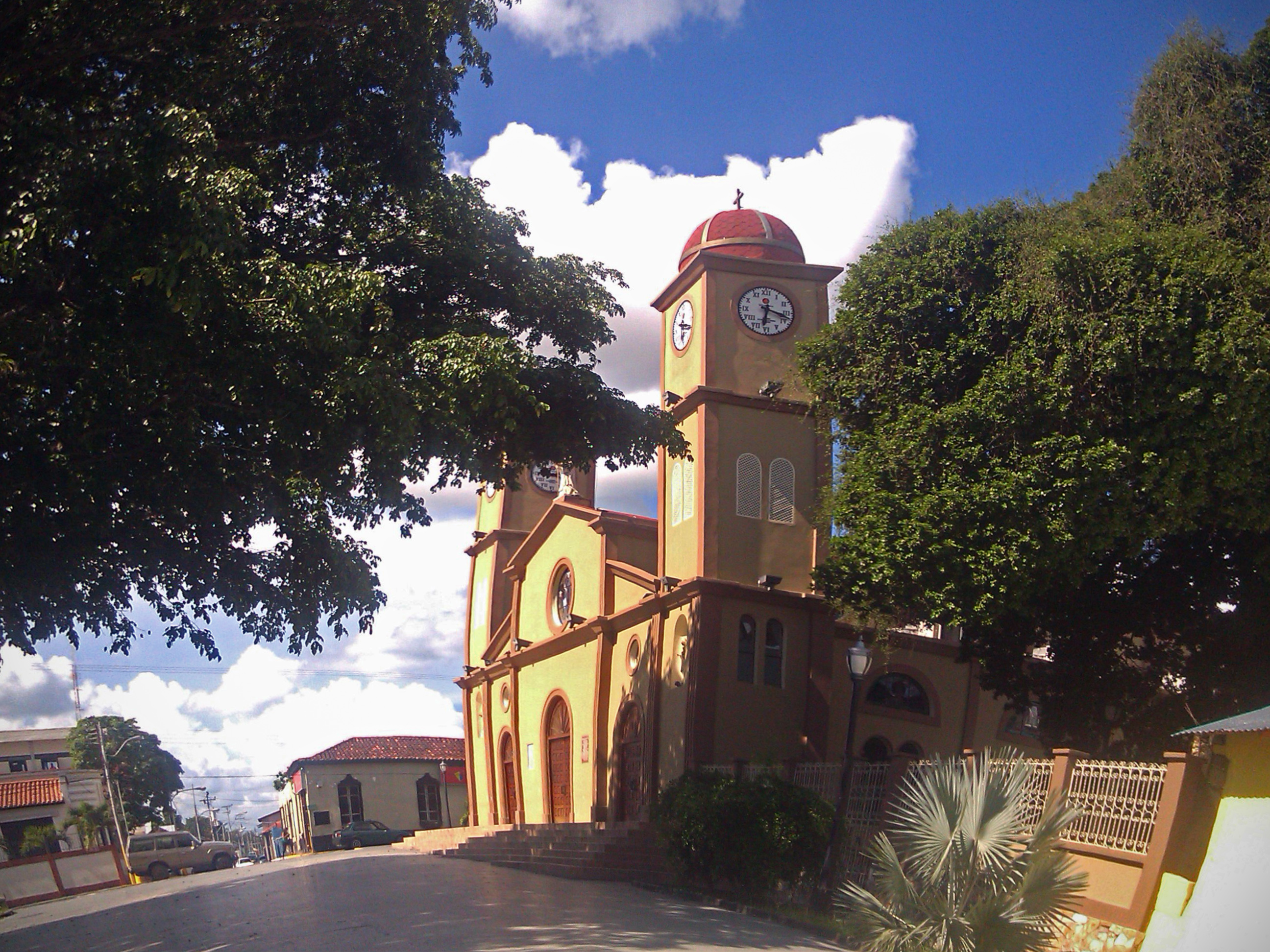 La iglesia de Santo Domingo de Guzmán, justo detrás de la toma está la alcaldía del municipio Cedeño. En Caicara de Maturín, Estado Monagas, Venezuela.